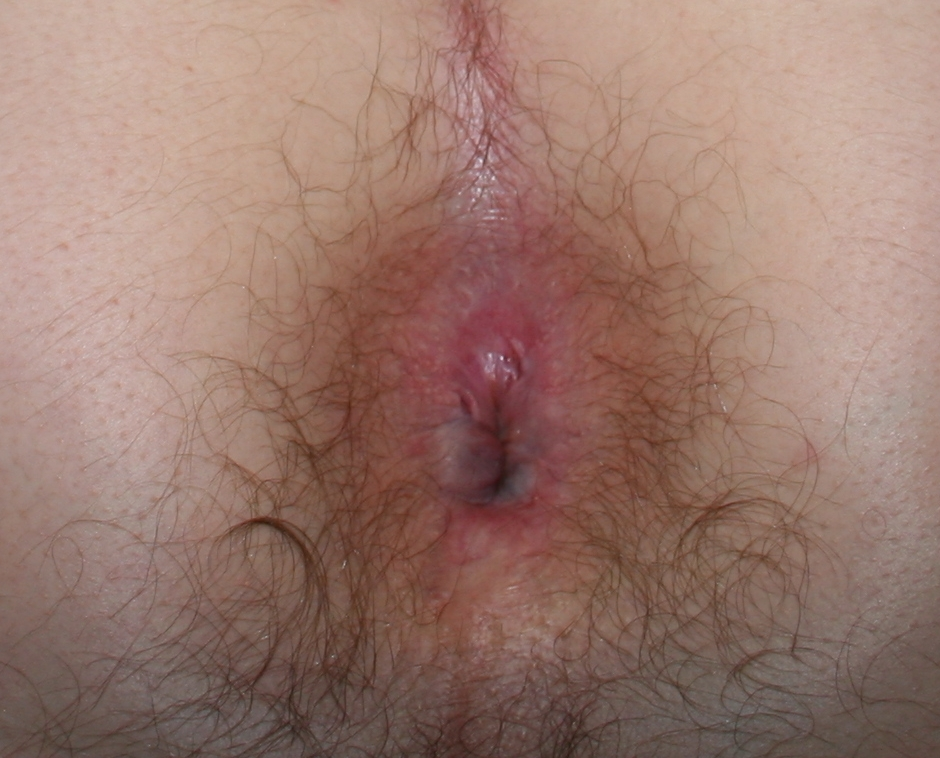 Perianal hematoma